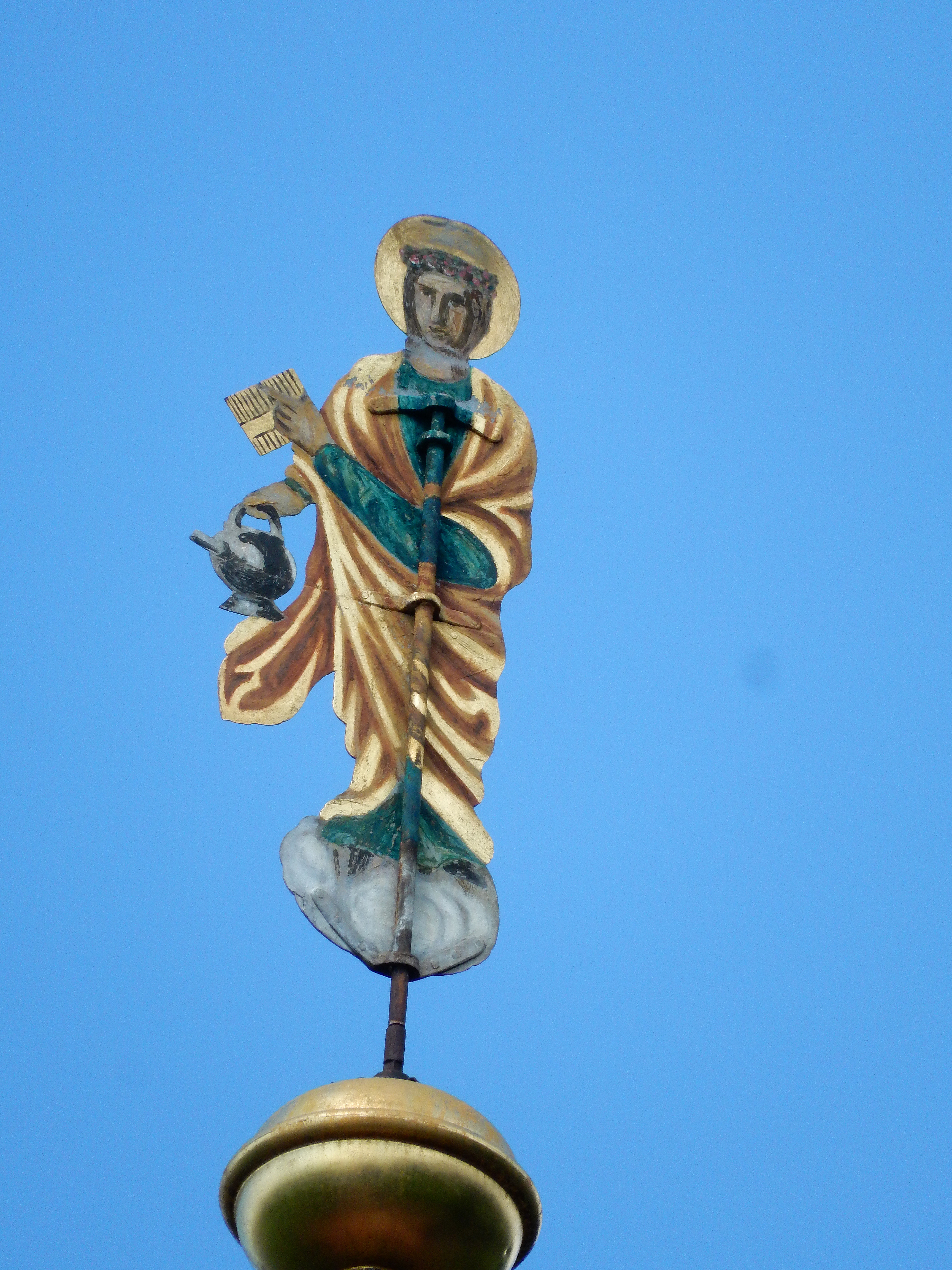 Zug, Kapelle St Verena, Spitze der Kuppel (2015)